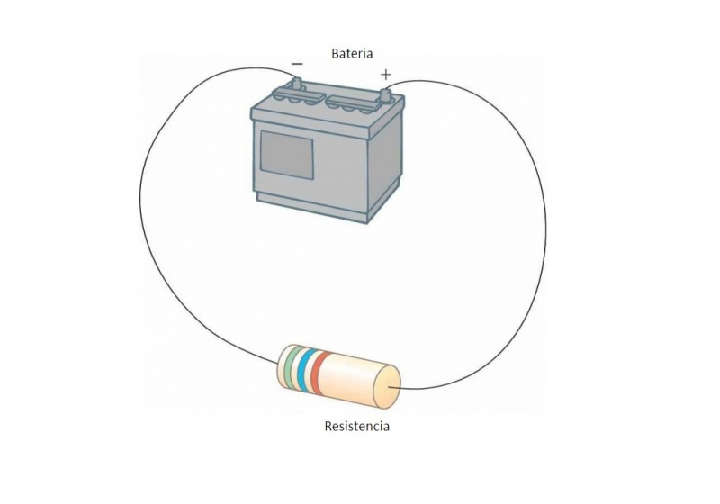 Batería y resistenecia